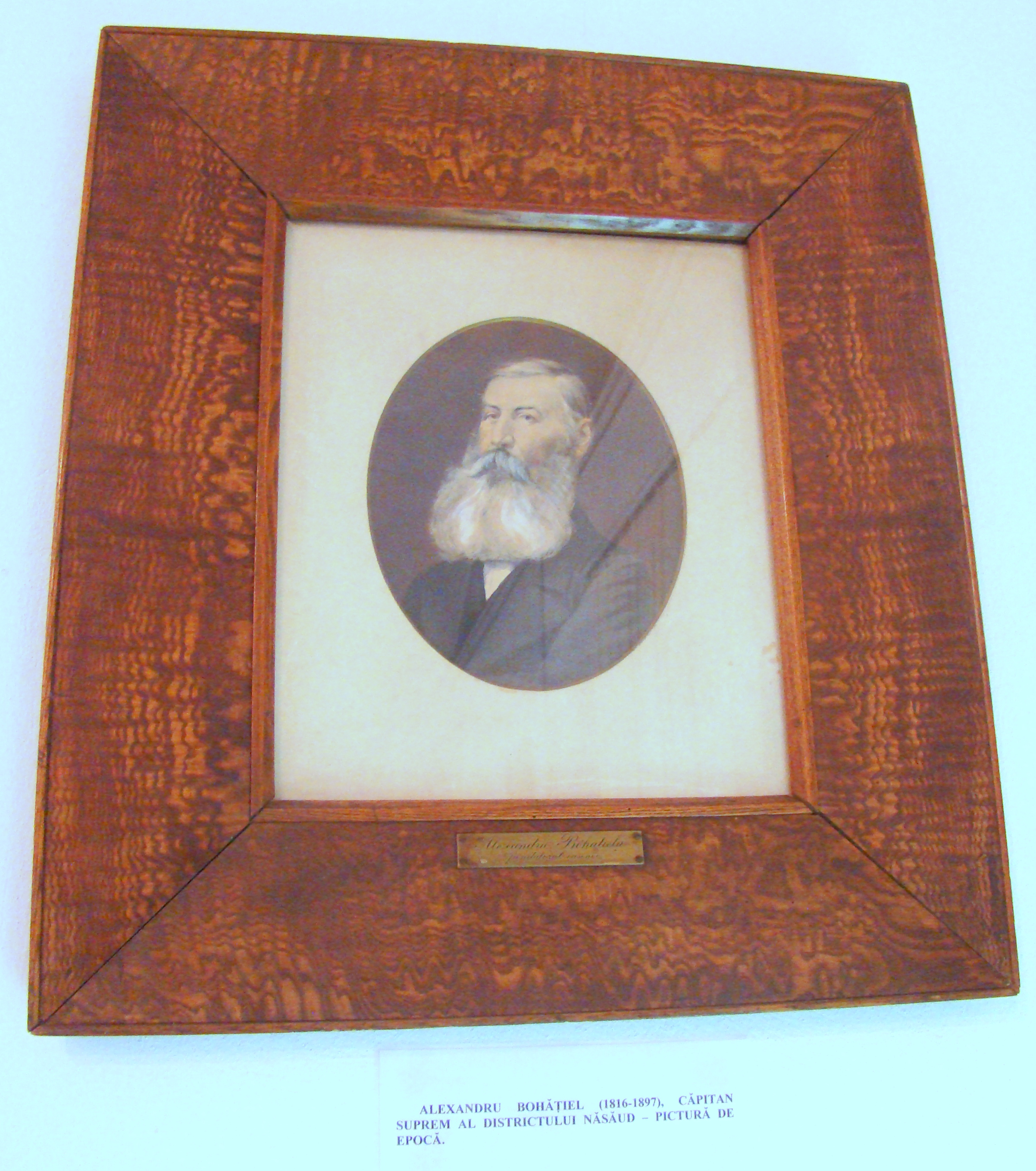 Muzeul grăniceresc năsăudean